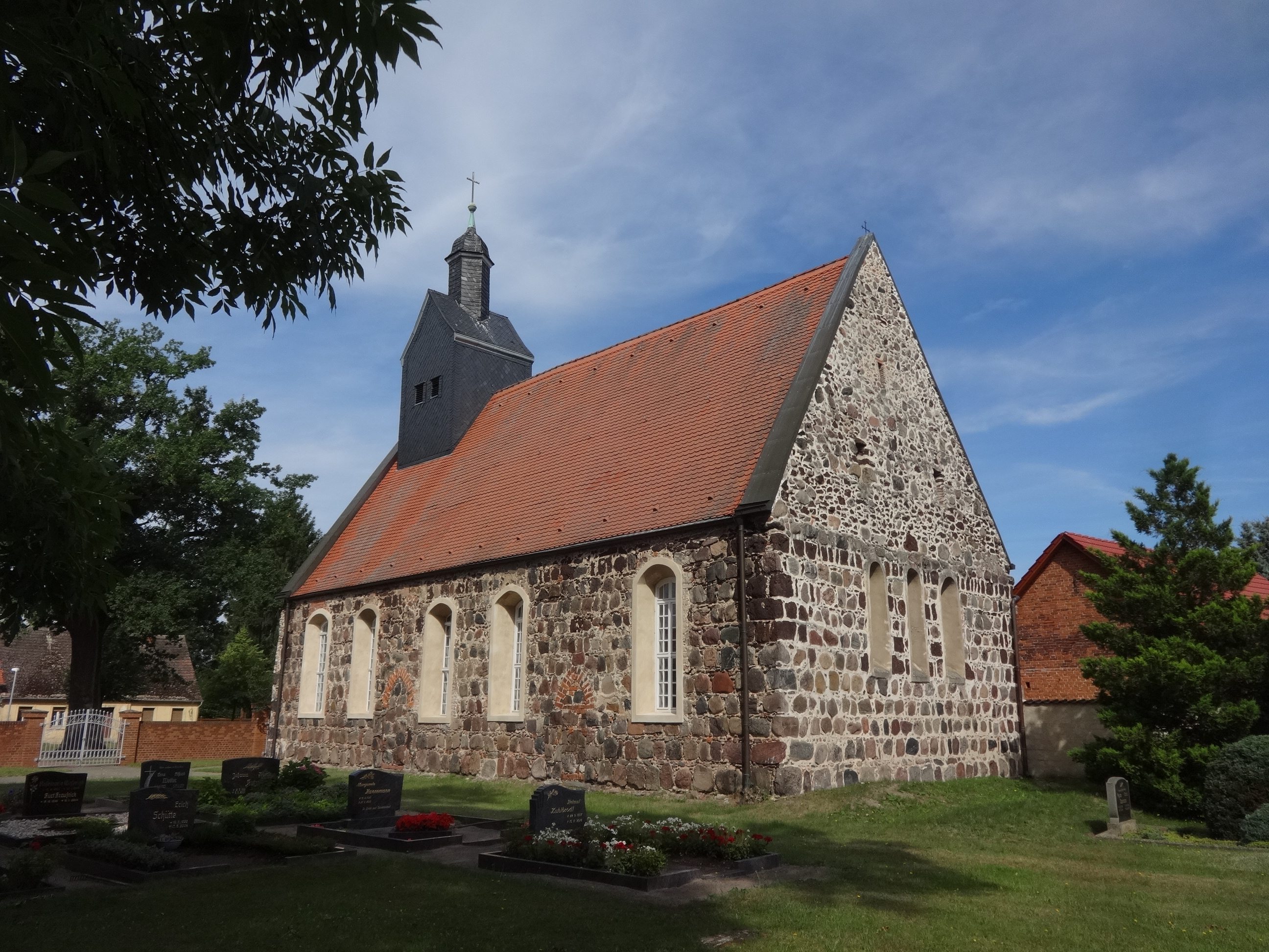 Die Dorfkirche in Frankenförde in der Gemeinde Nuthe-Urstromtal ist eine Feldsteinkirche aus der Zeit um 1300. In seinem Innern befinden sich ein Kanzelaltar aus dem 18. Jahrhundert und eine Empore aus der Zeit um 1700.